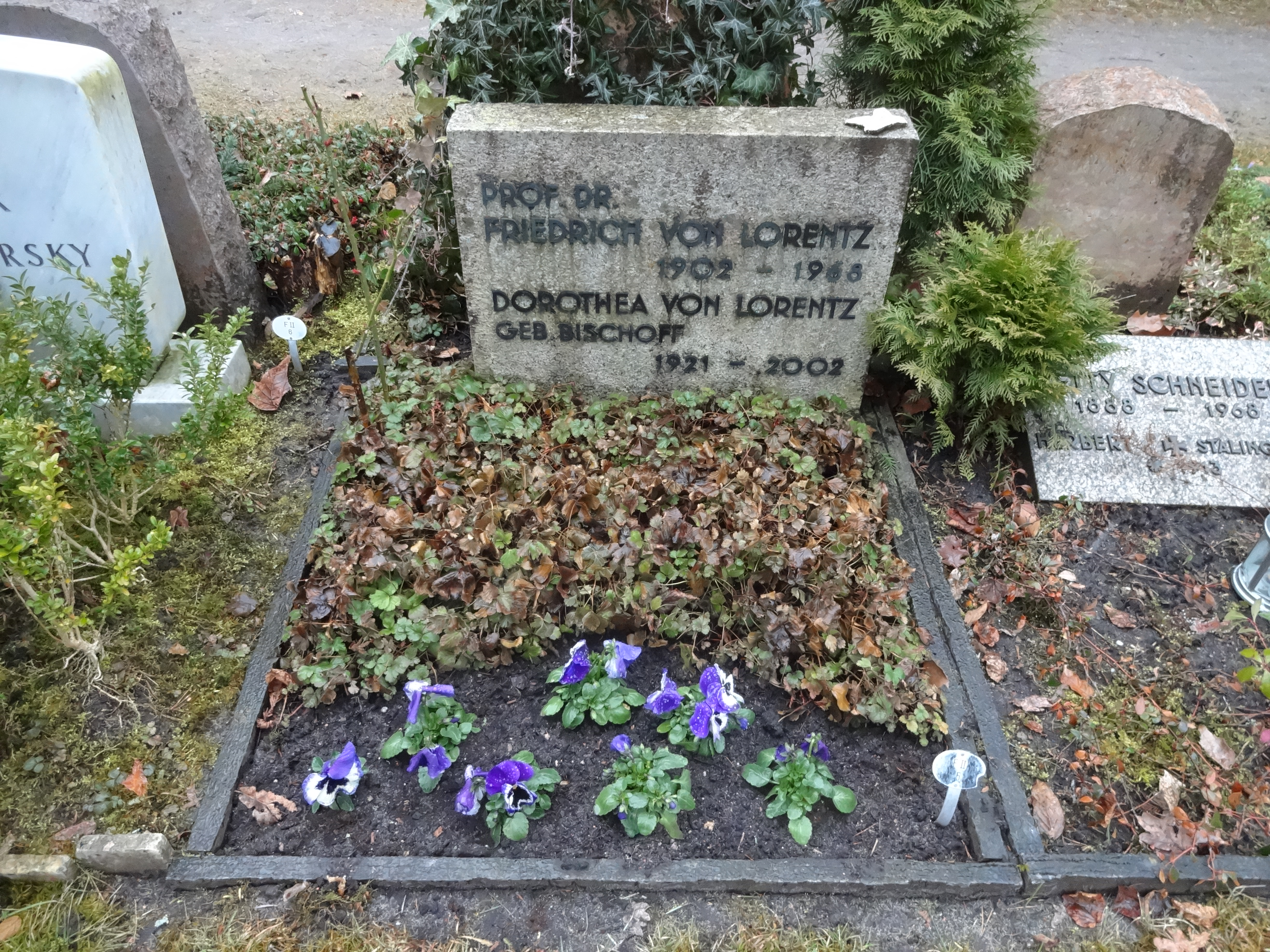 Grab von Prof. Friedrich von Lorentz auf dem Evangelischen Kirchhof Nikolassee